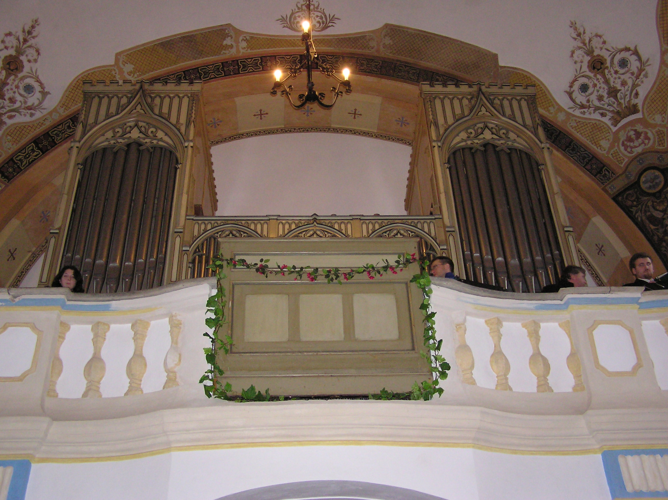 Varhany Martina Zausse